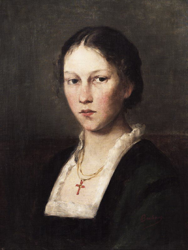 Mädchenporträt. Öl auf Leinwand, signiert, 62 x 44 cm